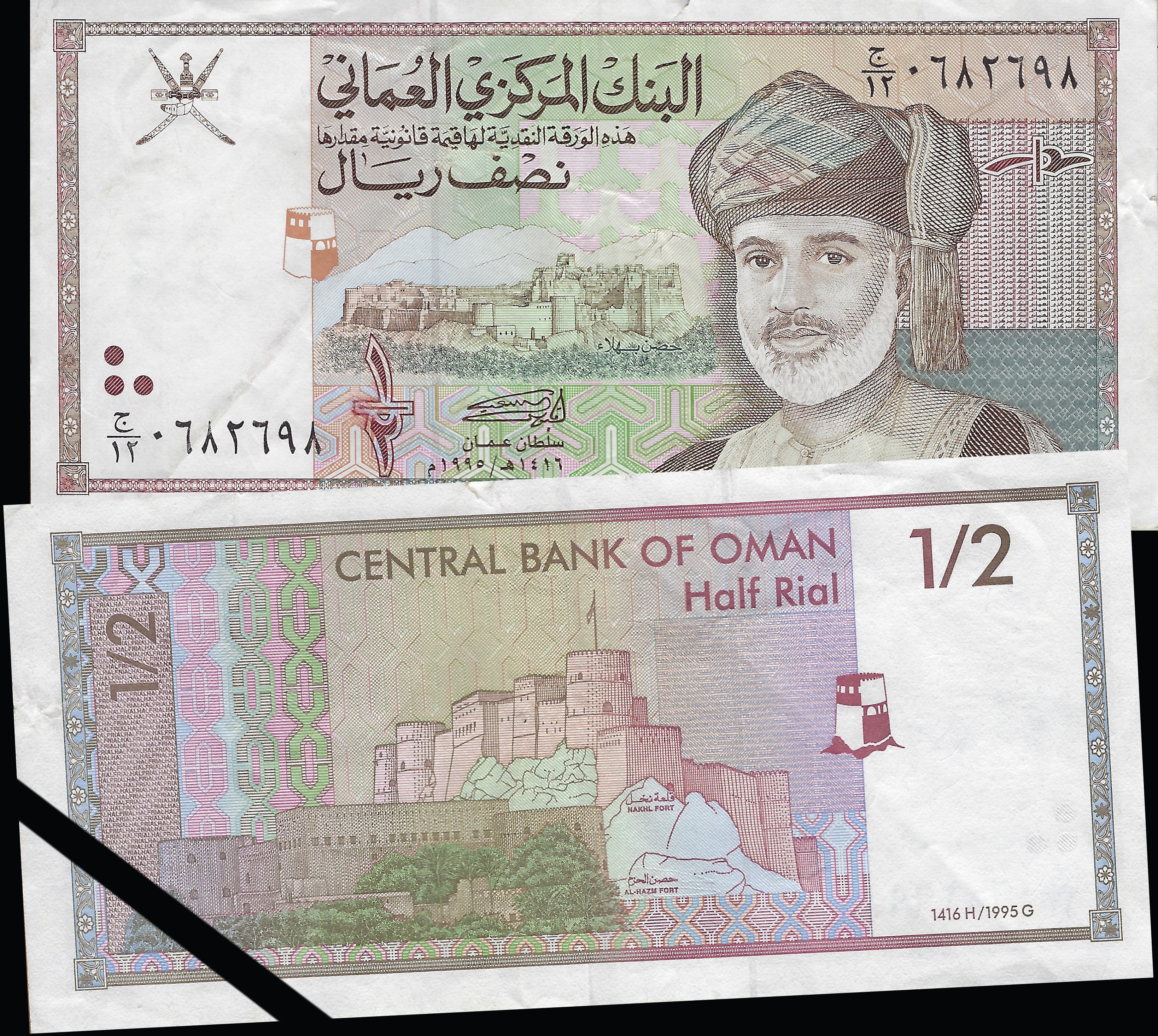 Billete de 1/2 rial de Omán con la efigie del sultan Qaboos bin Said Al Said en el anverso; serie de 1995